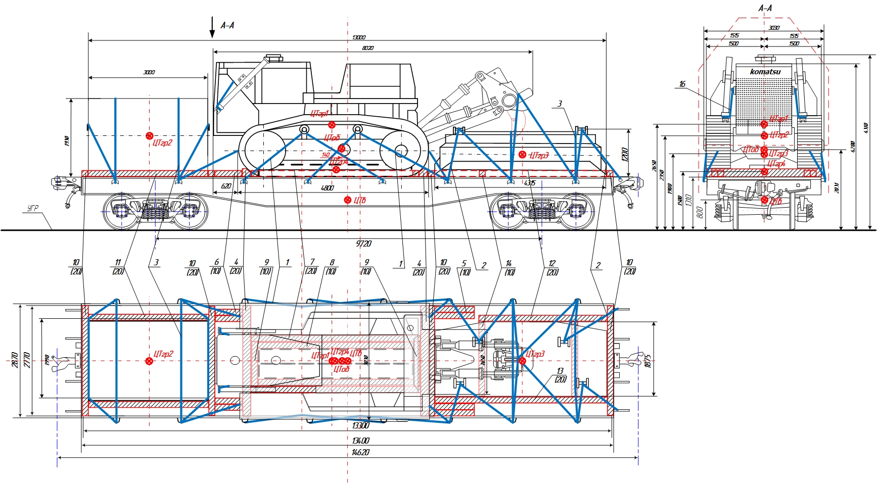 Схема погрузки бульдозера на железнодорожную платформу